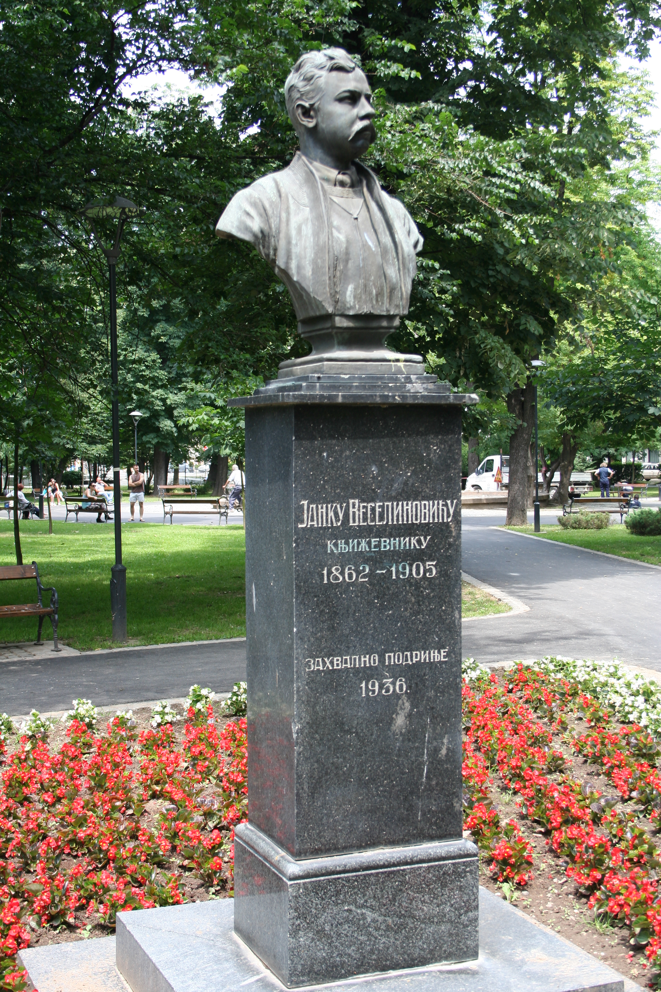 Spomenik Janku Veselinoviću (1862-1905), književniku u gradskom parku u Šapcu